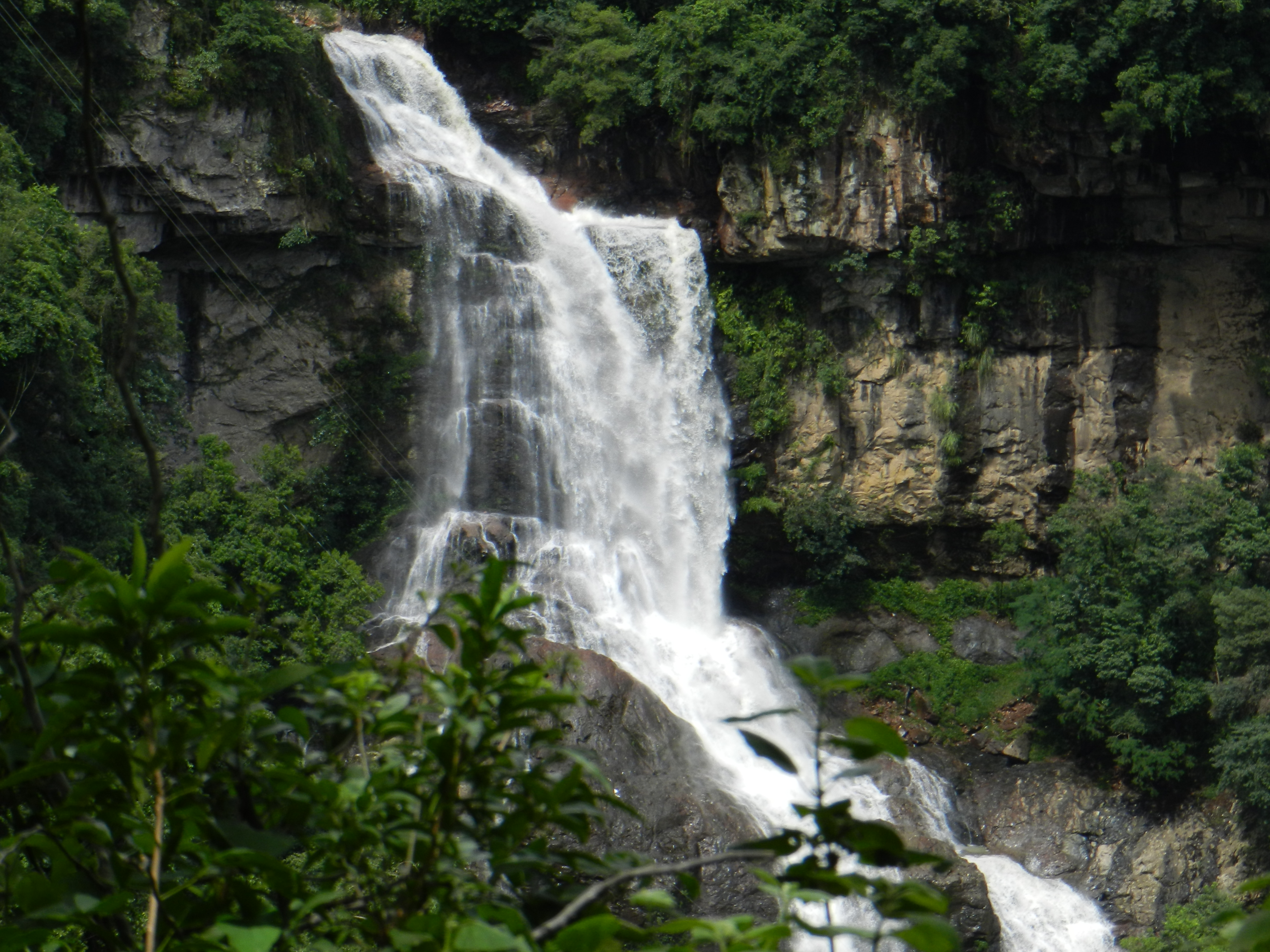 Cachoeira Véu da Noiva